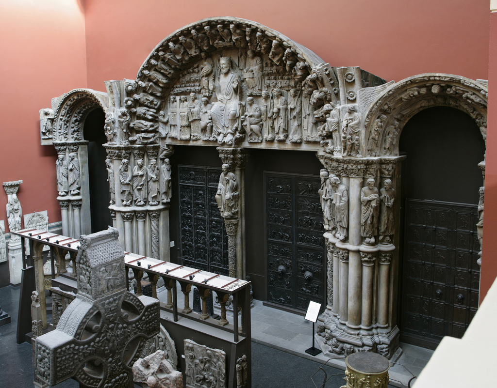 The Portico de la Gloira, Santiago de Compostela